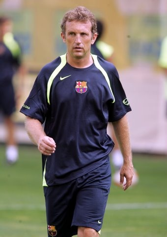 Albert Roca en su etapa como 2º Entrenador del FC Barcelona